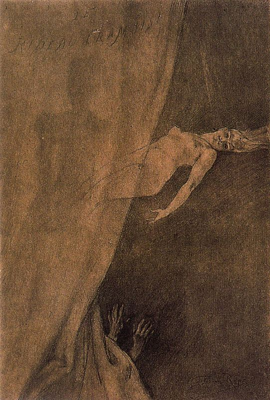 Illustration des Diaboliques de Jules Barbey d'Aurevilly (1808-1889)